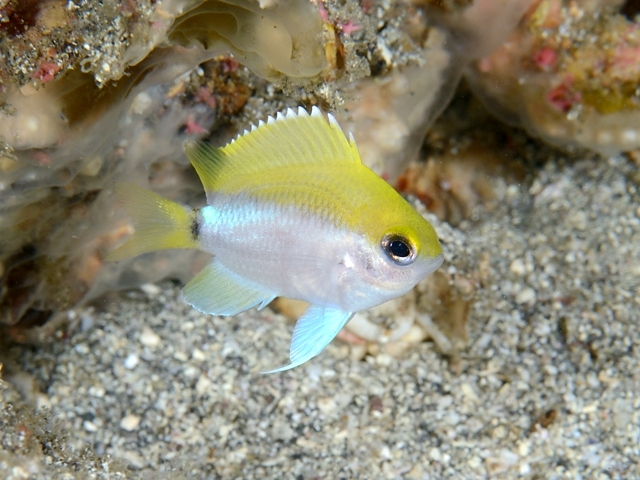 オビトウカイスズメダイ Chromis okamurai